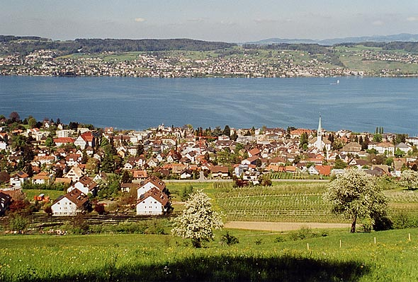 Blick auf Wädenswil und den Zürichsee